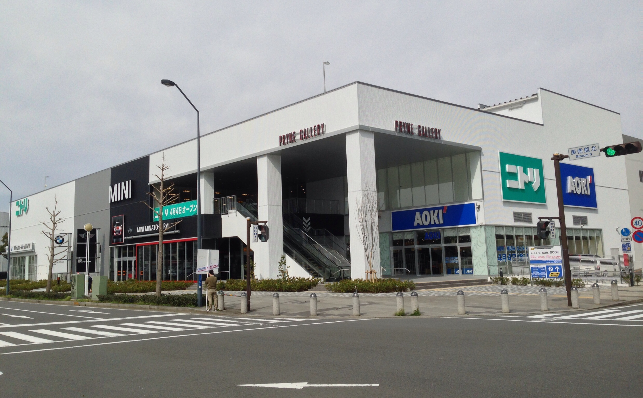 横浜みなとみらい地区（43街区）の岡田ビルによる暫定商業施設「プライムギャラリー」の外観。BMWやミニ、ポルシェの自動車ショールームの他、家具（インテリア）のニトリや紳士服のAOKIが入る。2014年4月開業予定。